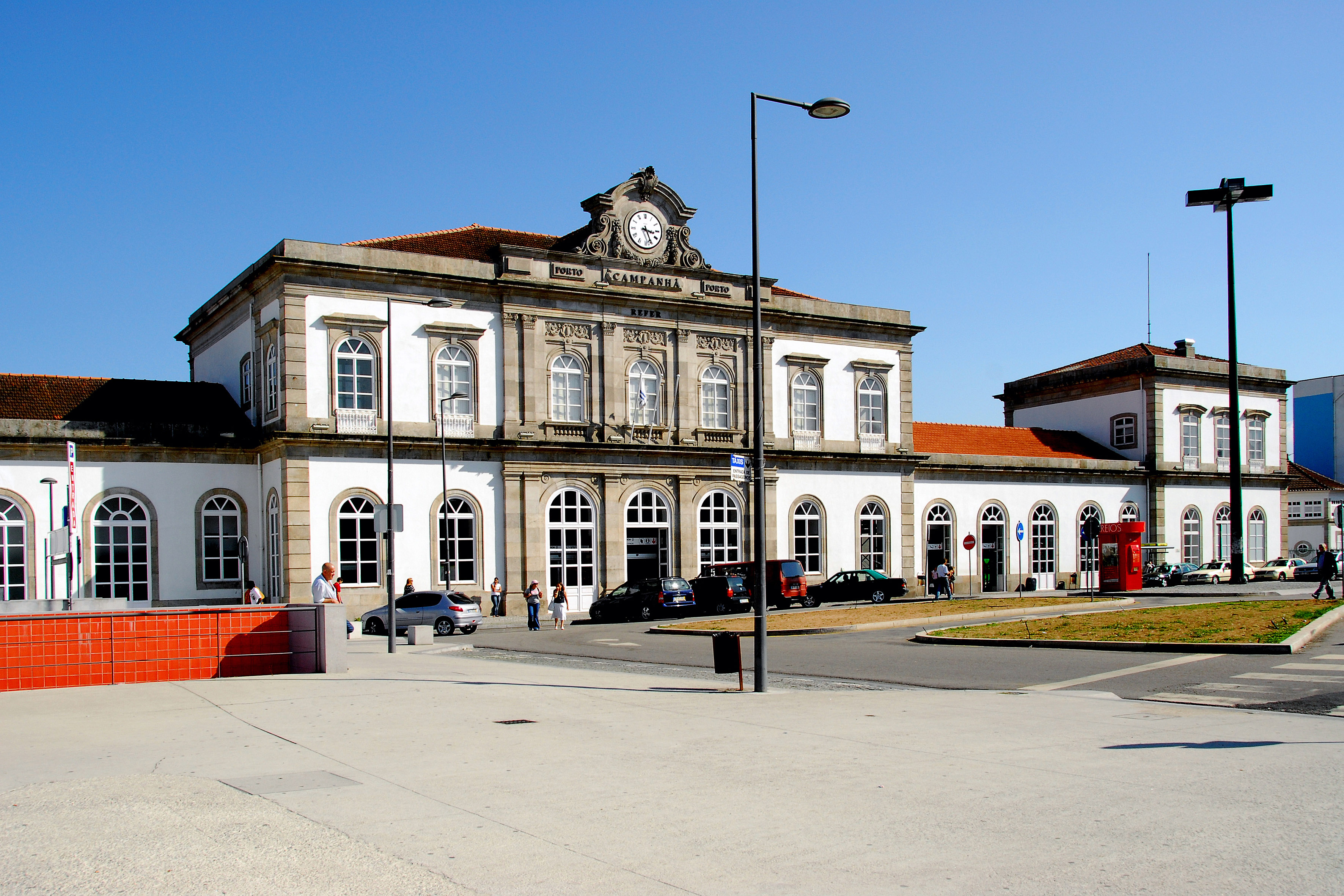 Campanhã-Estação Ferroviária de Campanhã This file was uploaded for Wiki Loves Monuments in Portugal with the unique identifier 97023030.